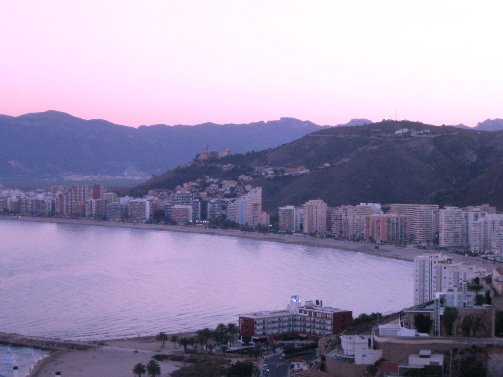 Atardecer en la bahía de Cullera